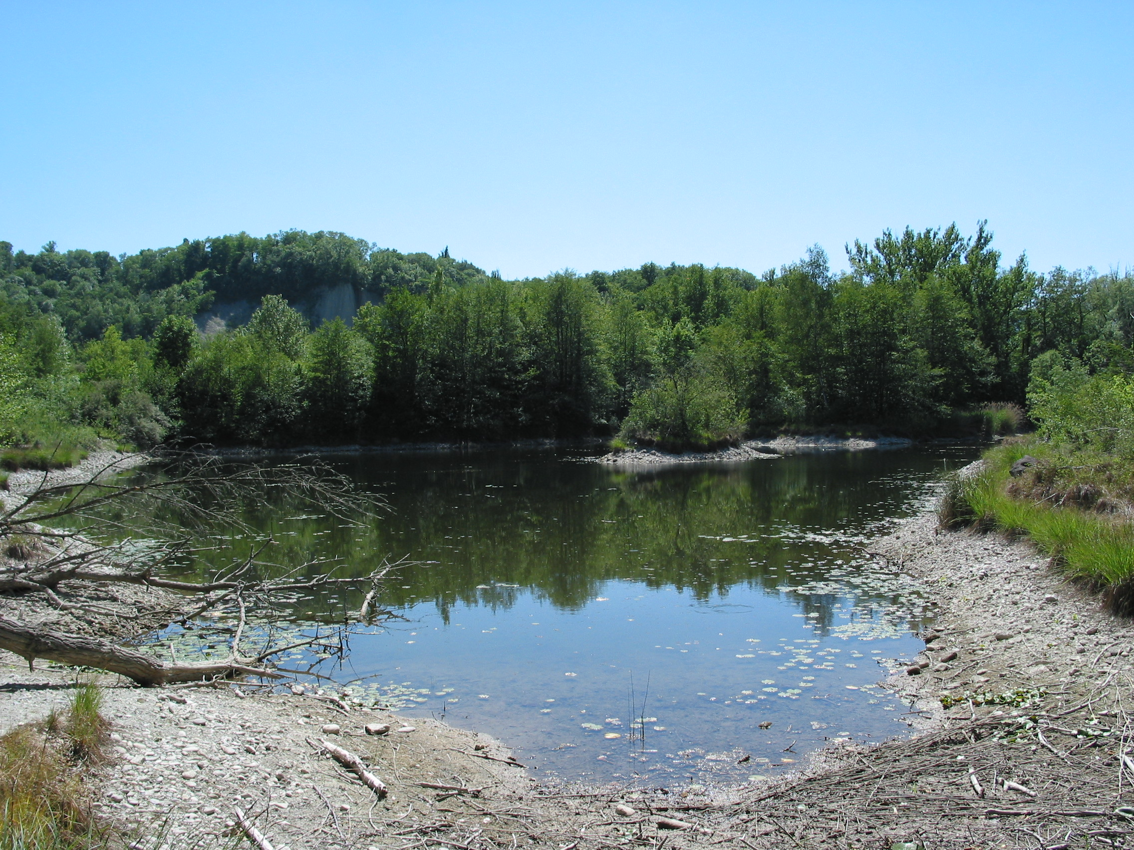 Cartigny, Switzerland